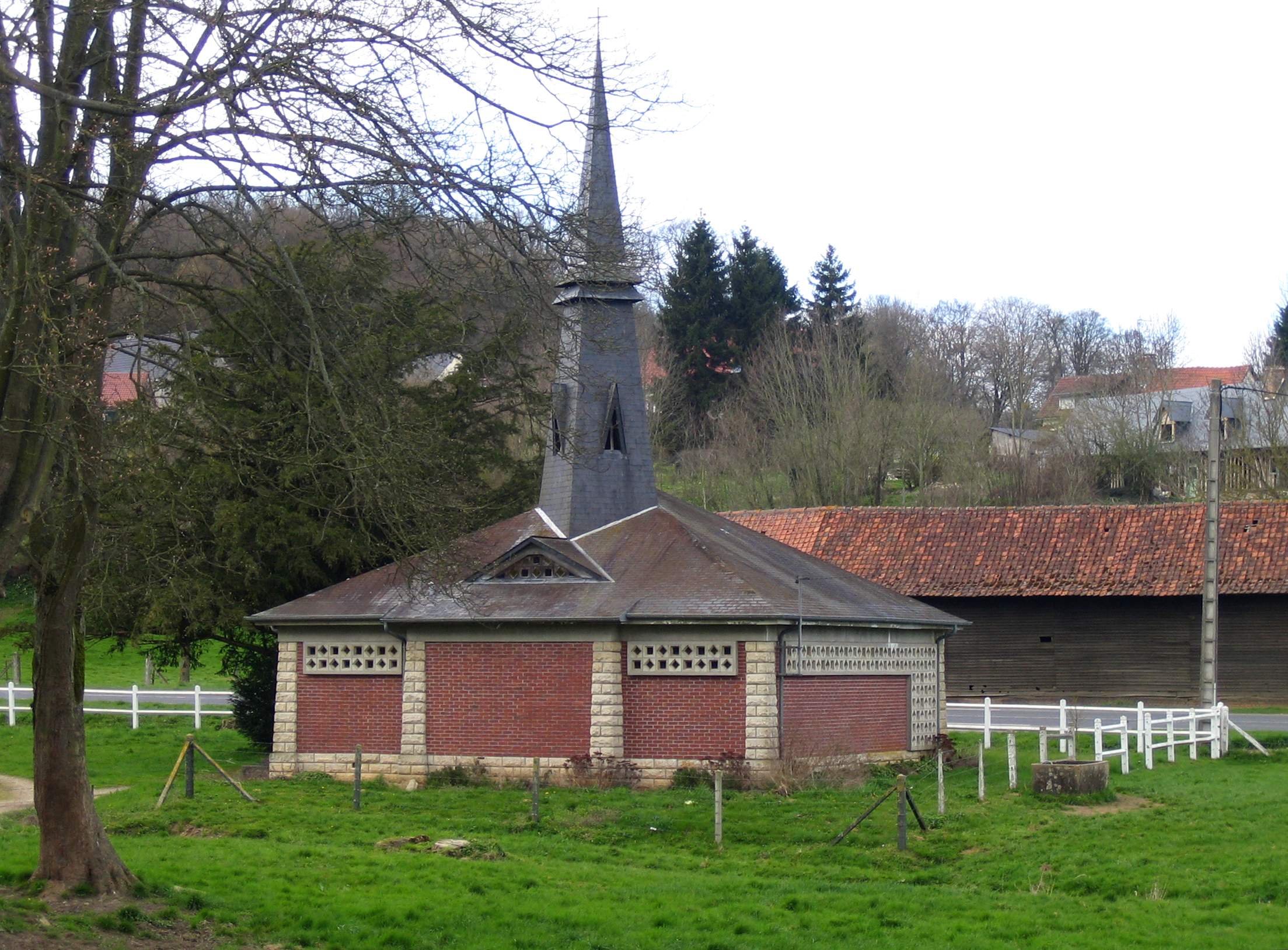 Woirel (Somme, France), chapelle Saint-Nicolas.